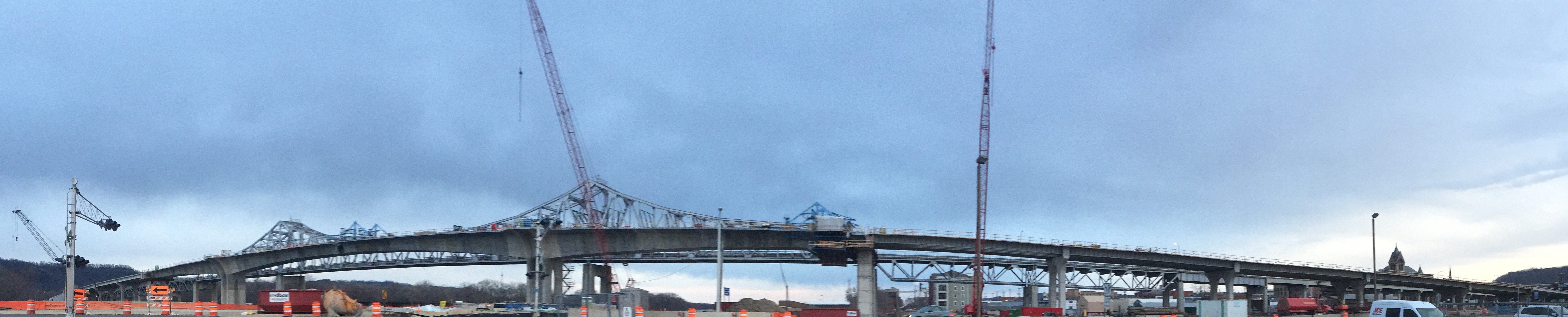 Winona bridge panorama